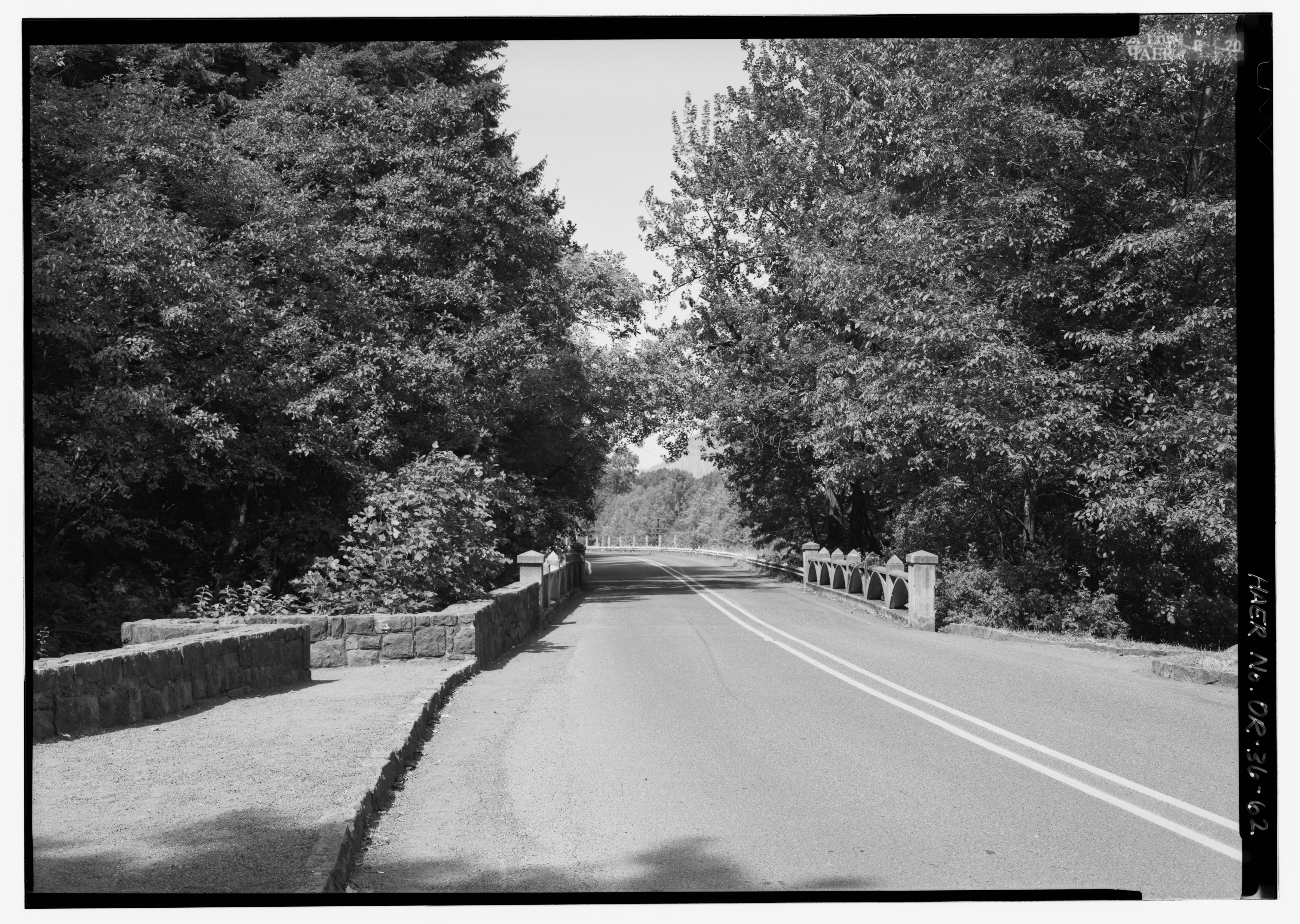 ROADWAY VIEW LOOKING WEST OF HORSETAIL FALLS BRIDGE. SAME PHOTO AS HAER No. OR-36-M-1.